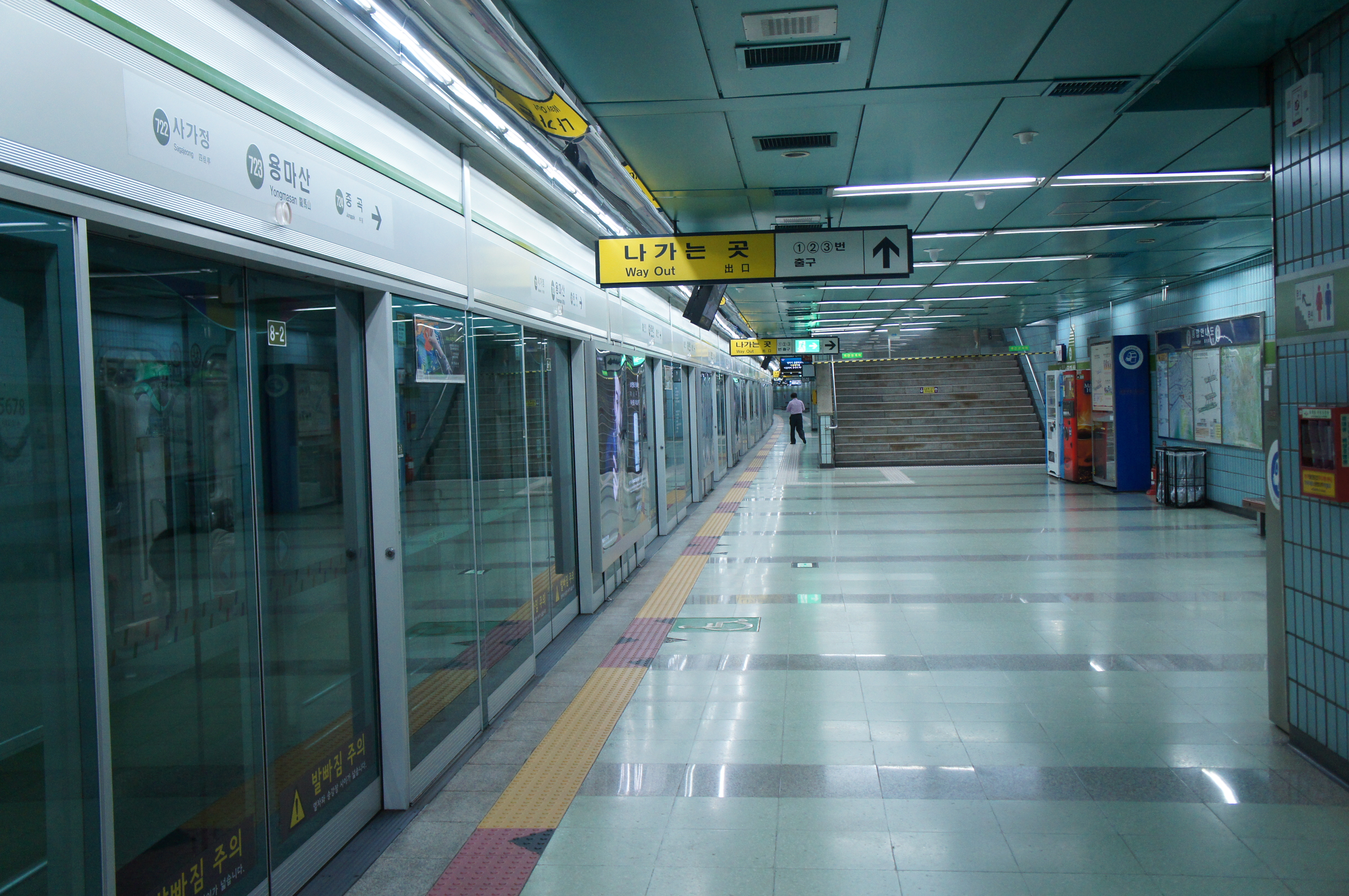 용마산역 승강장